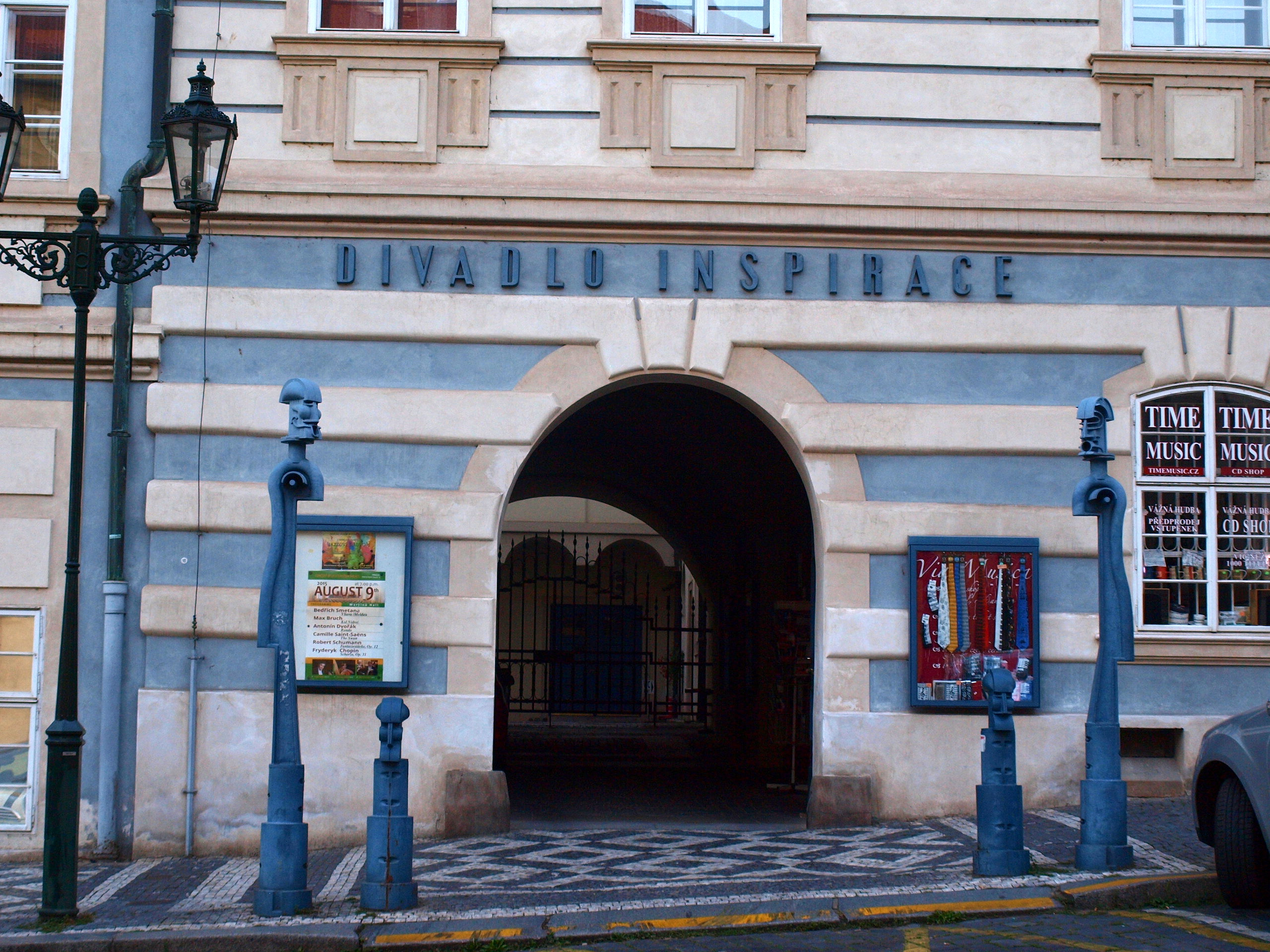 Lichtenštejnský palác na Malostranském náměstí